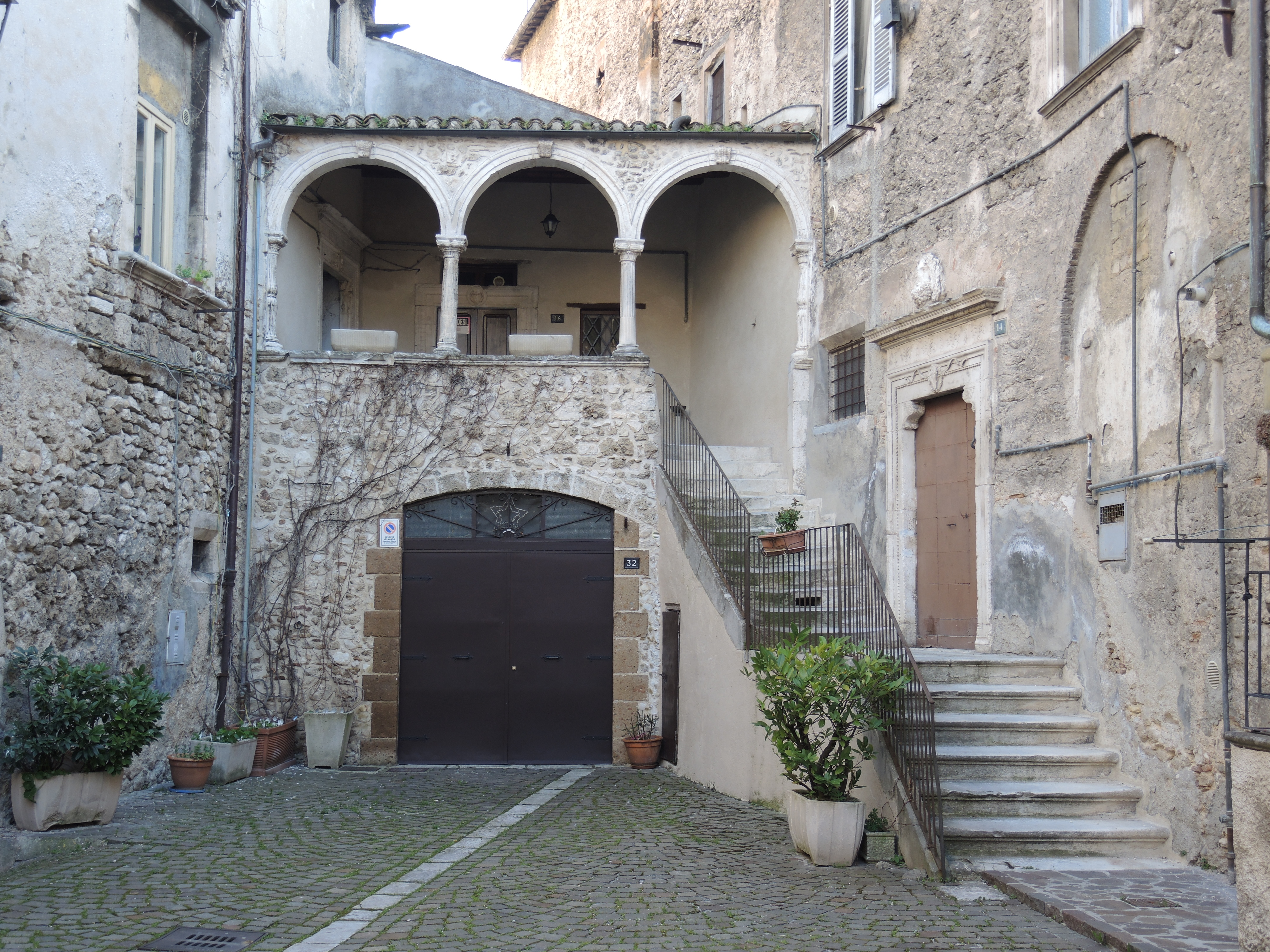 Popoli (PE): Buildings